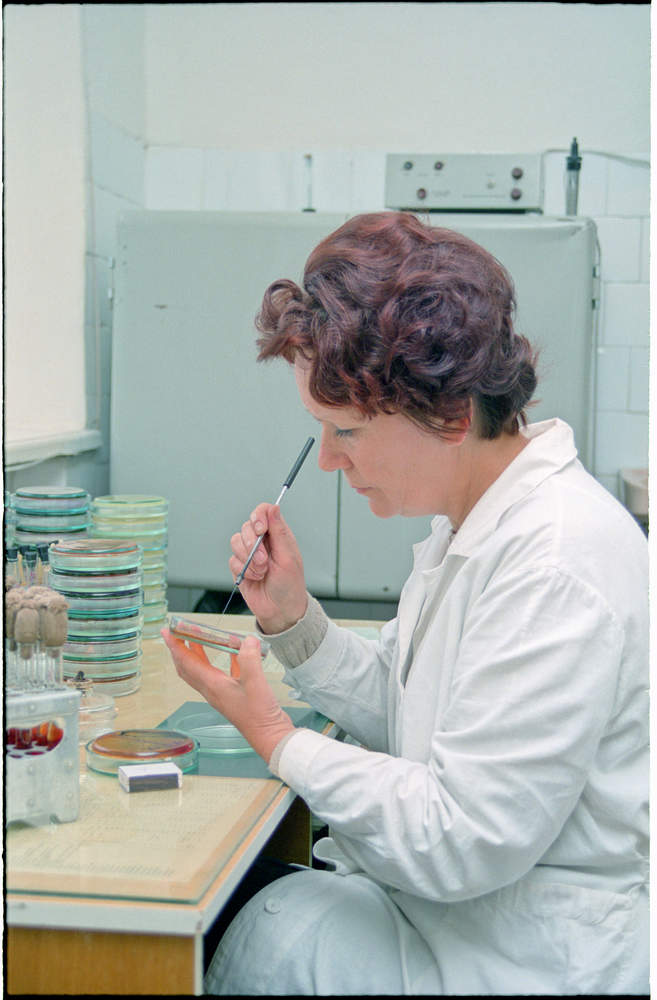 Лариса Ильинична Чащина — фельдшер-лаборант по бактериологии (с 1987 года). Она снимает колонии микроорганизмов за рабочим столом в группе кишечных инфекций в бактериологической лаборатории. В её руке металлическая петля для переноса исследуемых материалов. На заднем плане стоит термостат, который поддерживает температуру 37 градусов, оптимальную для роста бактерий. Сверху на термостате регулирующее устройство, которое задаёт необходимую температуру, и два термометра для контроля. На столе стоят чашки Петри, куда уже был засеян исследуемый материал. Затем эти чашки провели 24 часа в термостате для выращивания микроорганизмов, которые живут в кишечнике. Через сутки врач-бактериолог Дробина проверила чашки с выросшими микроорганизмами и выбрала колонии, подлежащие дальнейшему изучению, чтобы лаборанты по бактериологии сняли эти колонии на другие питательные среды для изучения их биохимических свойств. На столе стоит штатив с пробирками, закрытыми ватными пробками, со средой Олькеницкого. Чащина переносит туда колонии с чашек Петри. — В 1997 году Переславская санитарно-эпидемиологическая станция состояла из двух лабораторий: бактериологической (тут же велись паразитологические исследования) и санитарно-гигиенической. Бактериологическая лаборатория включала группу кишечных инфекций, группу капельных инфекций, санитарную группу. На группе кишечных инфекций проводятся исследования кала на микроорганизмы дизентерии, сальмонеллеза. Переславль-Залесский, улица Красный Текстильщик, дом 11.